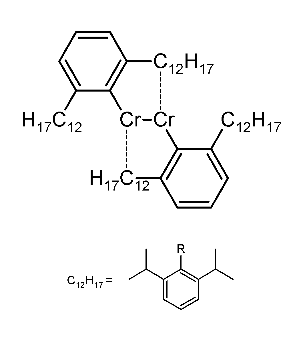 Quintuple Cr-Cr bond